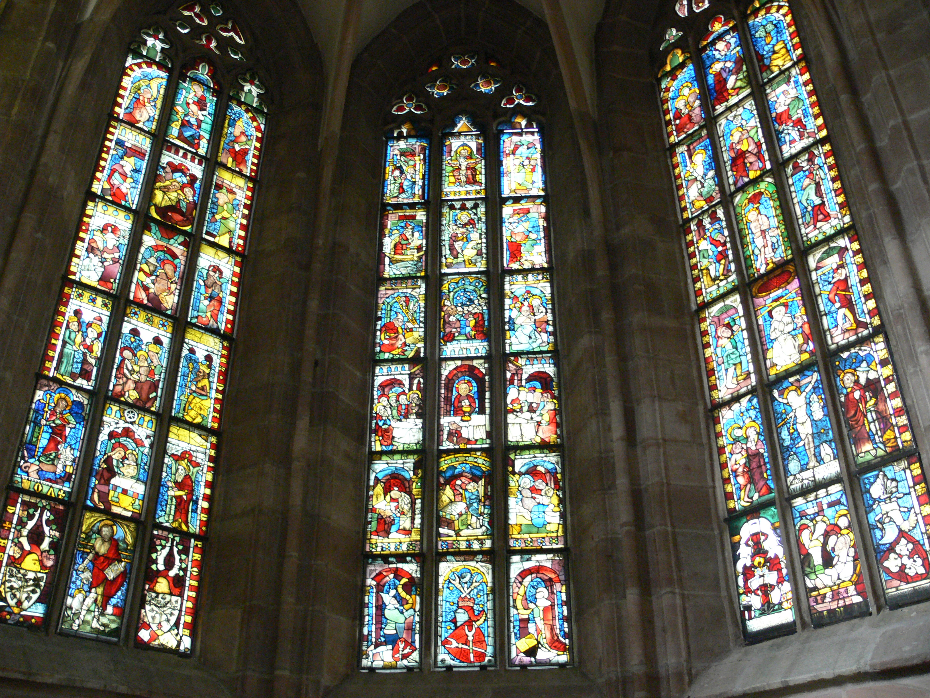 Nürnberg, Kirche St. Martha Glasfenster im Chor: links das Fenster Nord II (Groß-Fenster, um 1390), in der Mitte das Fenster I (Waldstromer-Fenster, um 1390), rechts das Fenster Süd II (Stromer-Fenster, um 1390)